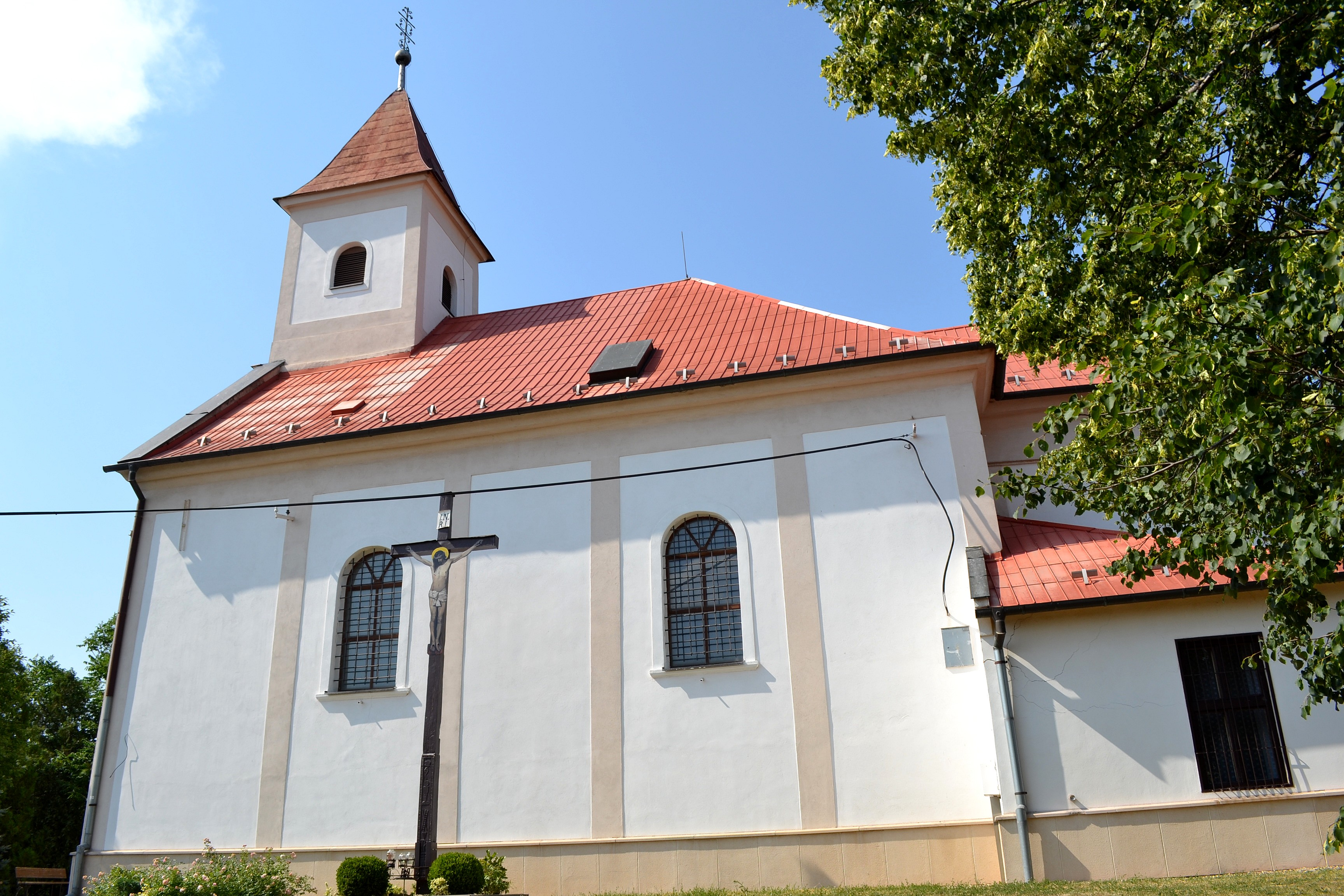 Vinosady (okr. Pezinok), Kostol svätého Martina; pohľad na kostol od juhu